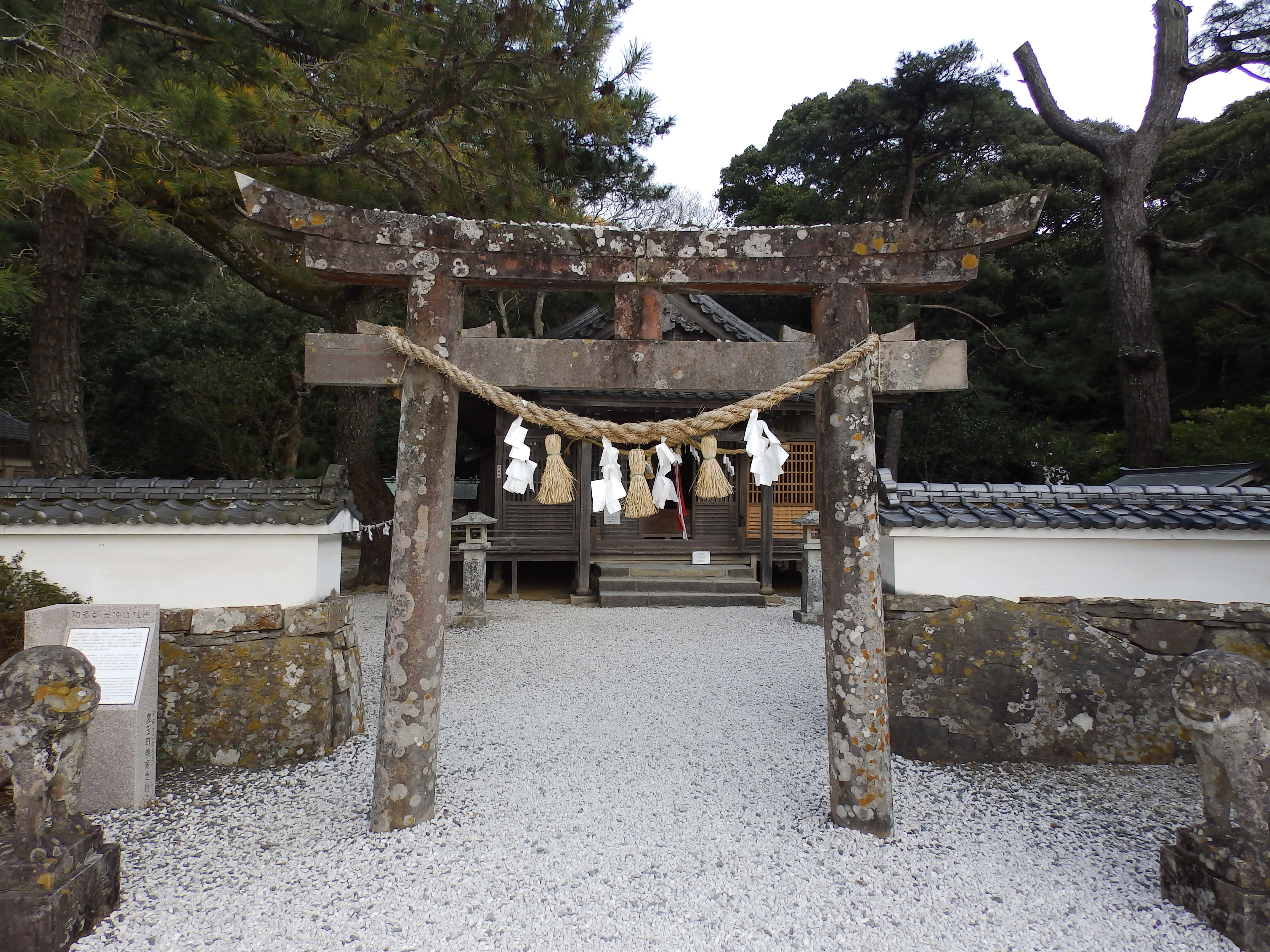 駐車場側から陸側を